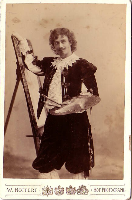 Schauspieler Josef Kainz